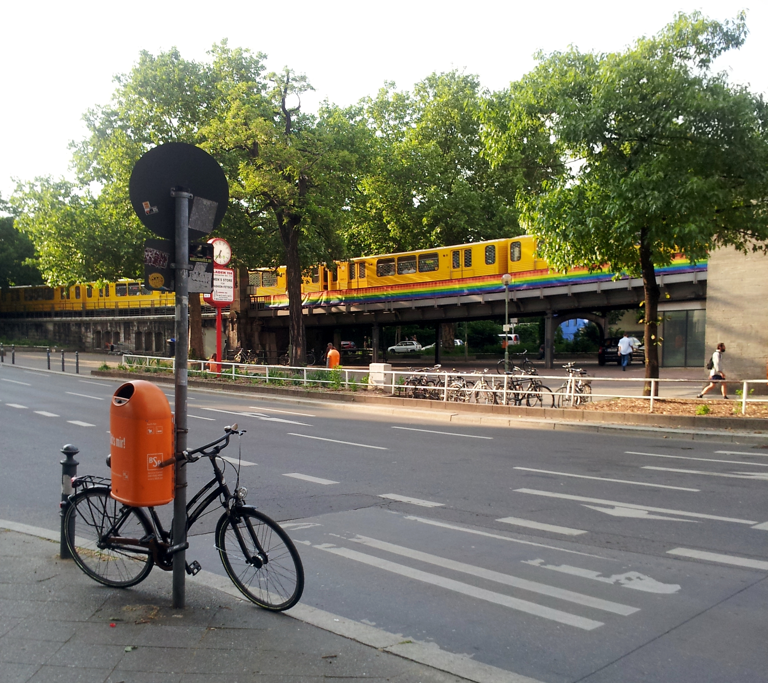 Regenbogenfahne am Nollendorfplatz